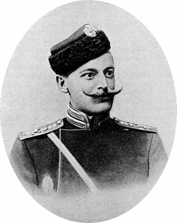 Граф Александр Александрович Нирод, капитан Генерального штаба, убитый 26 июня 1904 года в арьергардном бою при Гайчжоу.